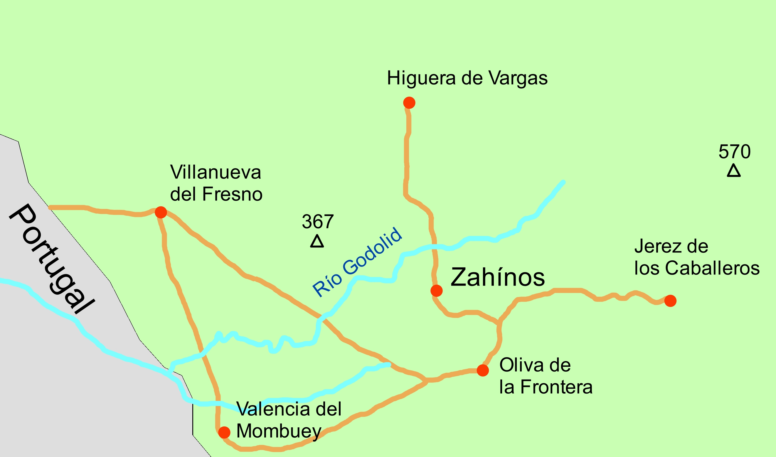 Mapa de Zahínos (Badajoz) y las localidades próximas.